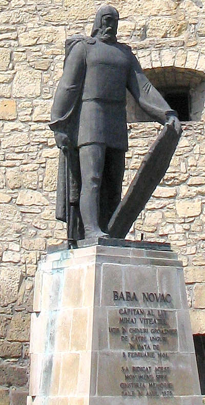 Statue of Baba Novac in Cluj-Napoca, Romania.